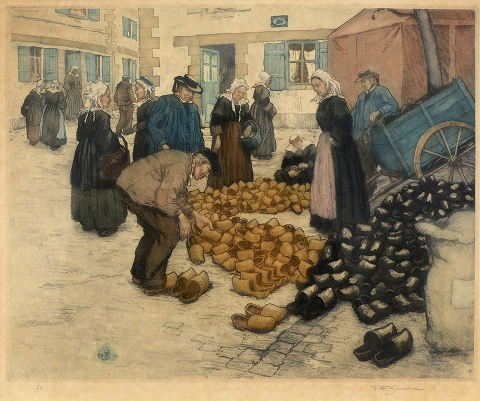 Dans un décor urbain, scène de marché présentant un groupe de personnages autour d'un étal de sabots. A l'arrière-plan à droite, devant une tente, un homme est accoudé à une carriole. Hommes et femmes portent des costumes traditionnels (plusieurs types de coiffes)